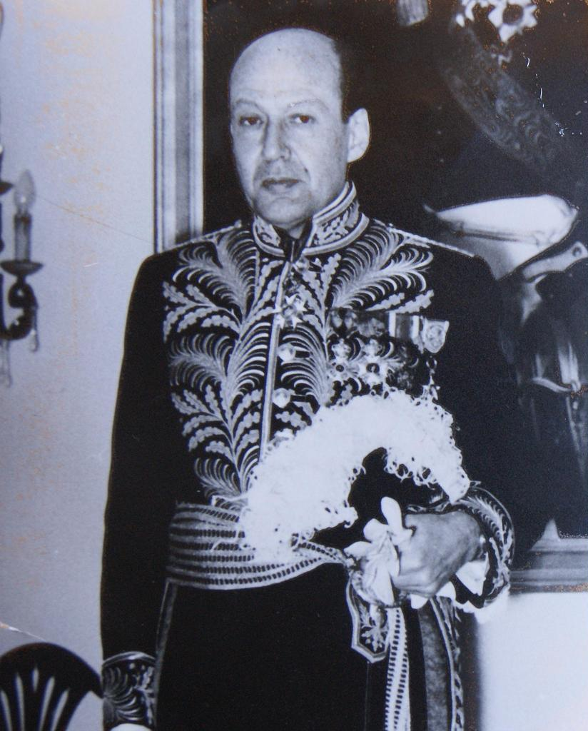 Photo Baron Antoine Beyens 3